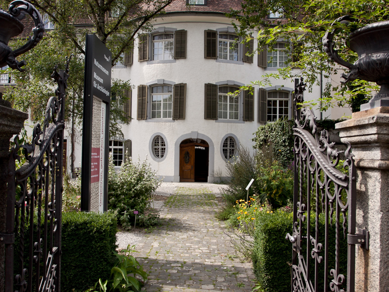 Naturmuseum Thurgau Eingang Museumsgarten